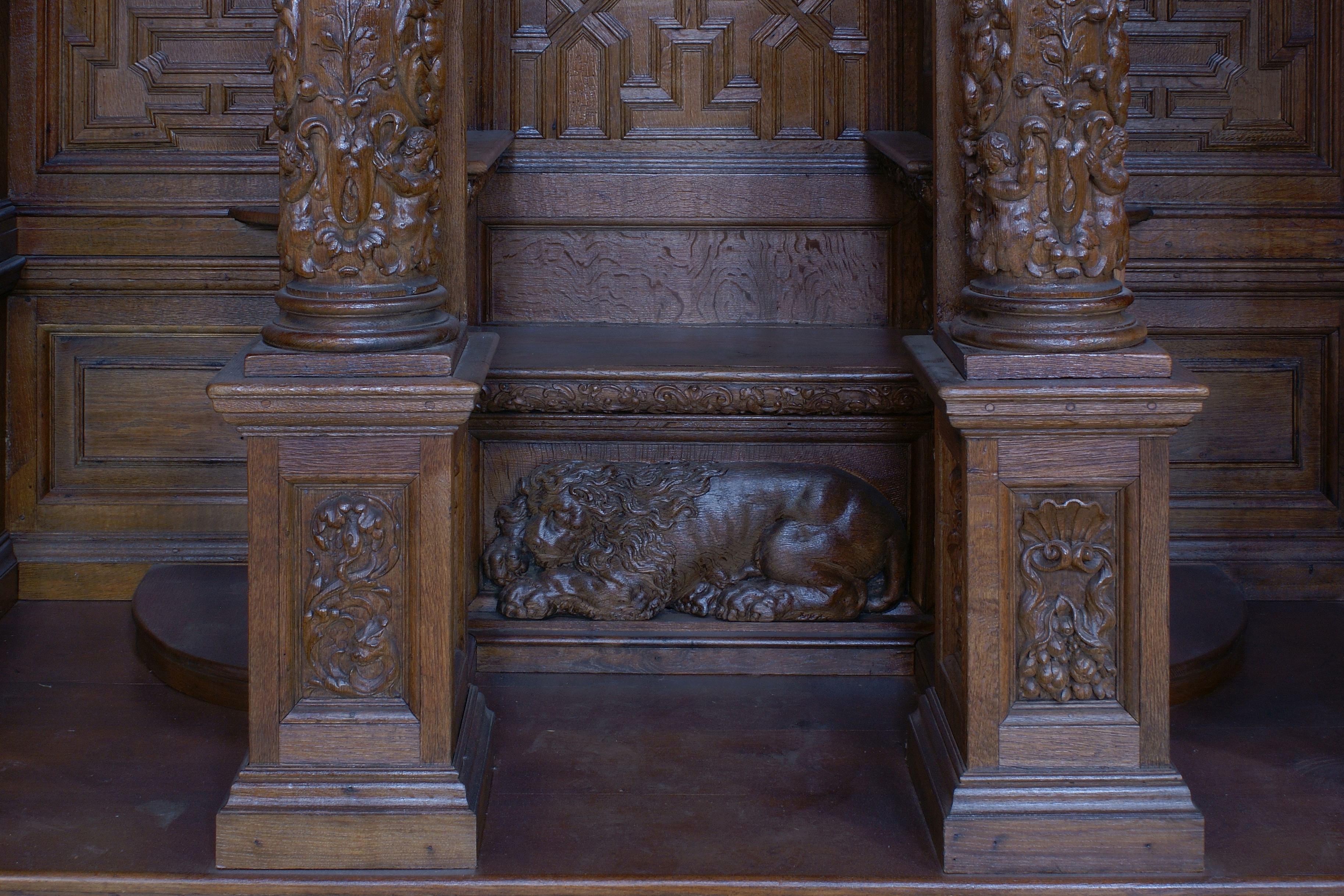 Eglise Saint-Loup (Namur) Confessionnal (détail); Saint-Loupkerk (Namen) Biechtstoel (detail)